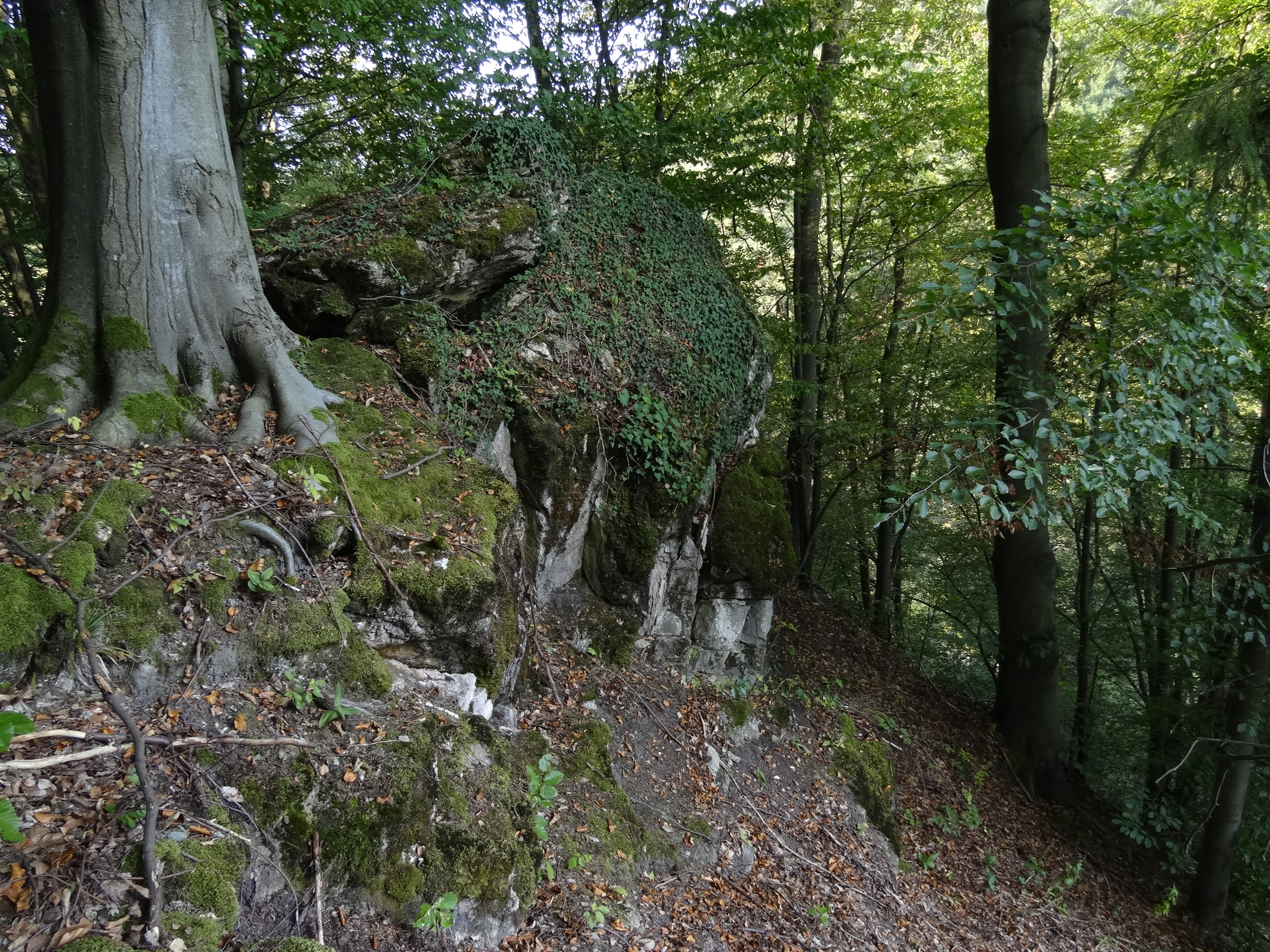 PP Na Vápenici (mezi Železným Brodem - osadou Propastný a Koberovy) chrání regionálně významné porosty vápnomilných a květnatých bučin na vápenatém podkladu s výskytem kriticky ohrožené kapradiny hrálovité a stratigraficky významné paleontologické naleziště.